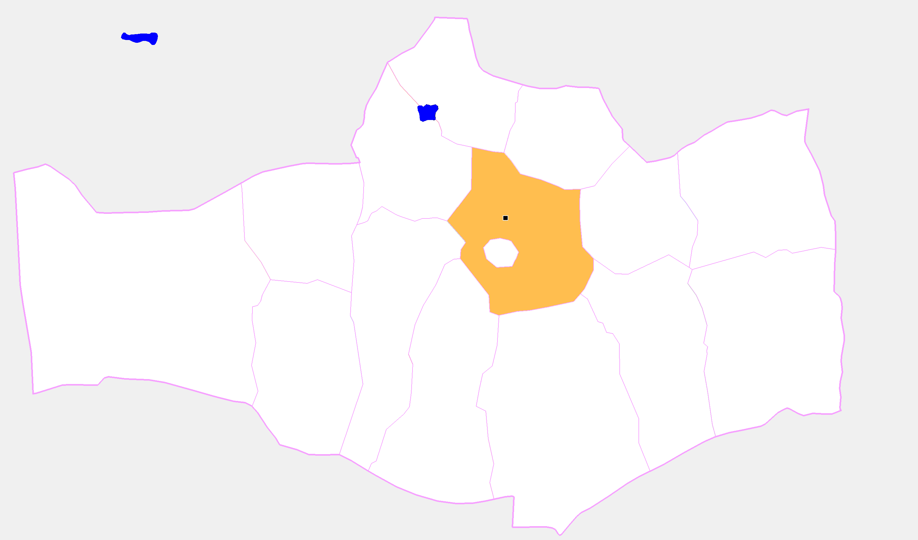 Монгол: Өмнөговийн Ханхонгор сумын байршил